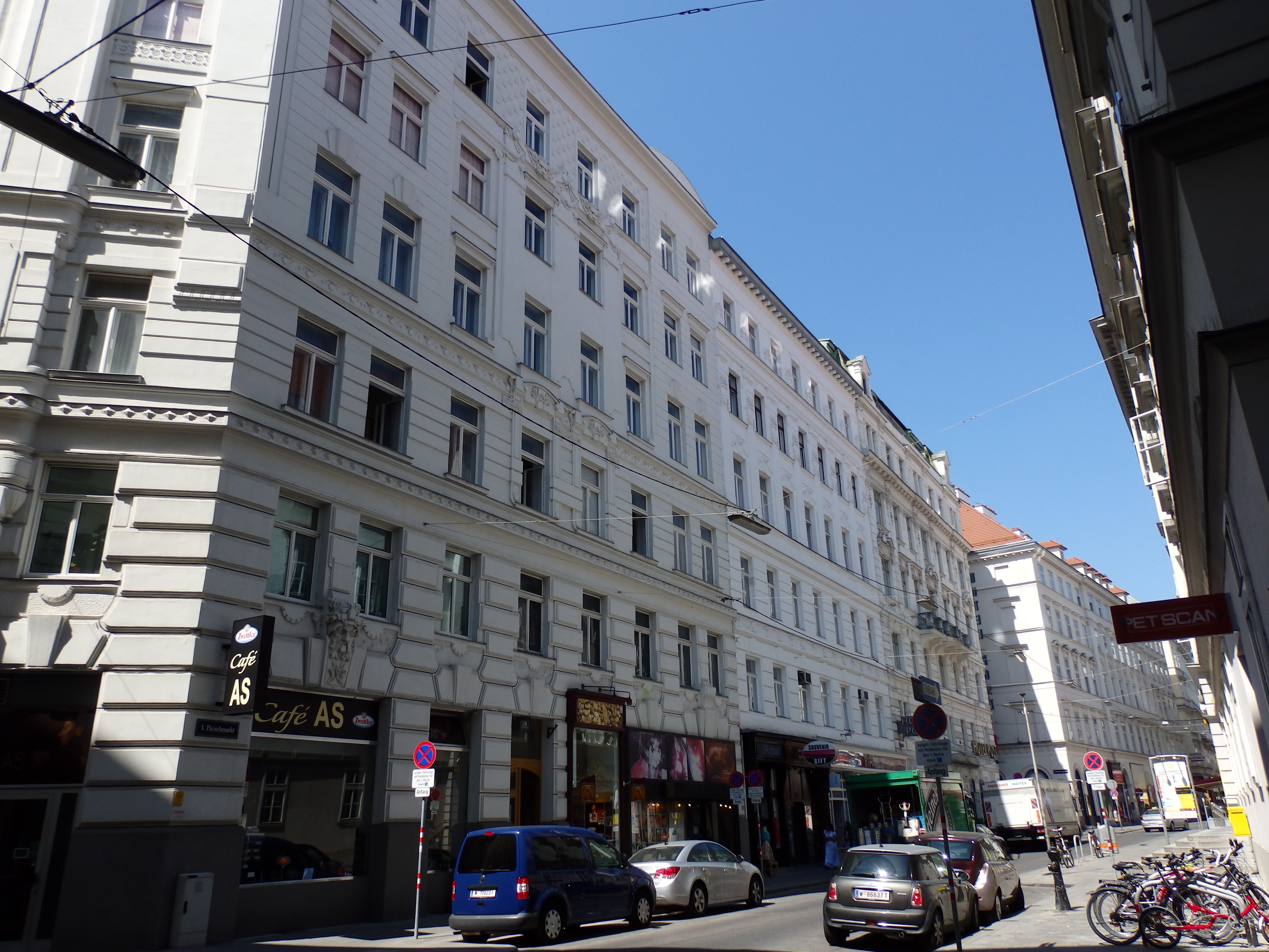 Fleischmarkt von der Postgasse gegen Westen, Wien-Innere Stadt